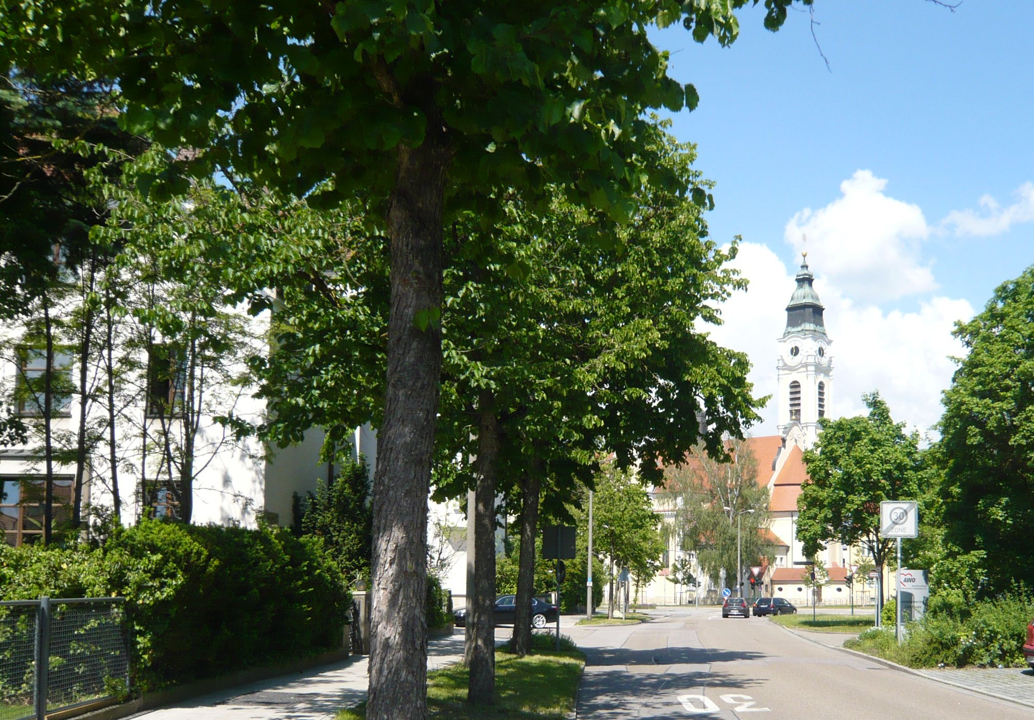 Ortsbild Reinhausen mit der neobarocken Pfarrkirche St. Josef